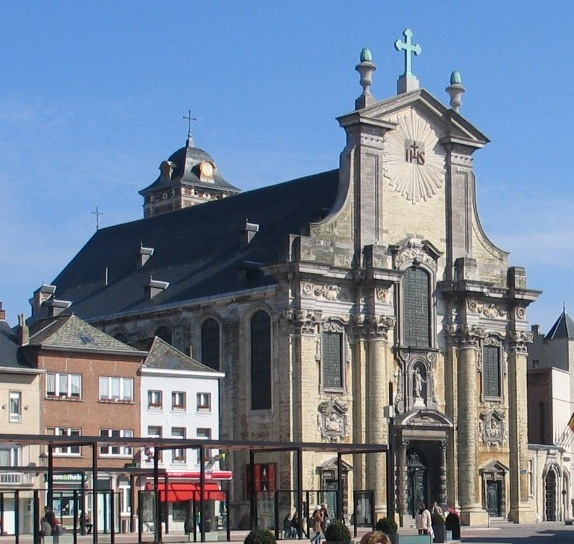 Pieter- en Pauluskerk in Mechelen - eigen foto